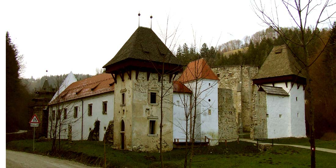 Žiče, zunanji izgled samostana